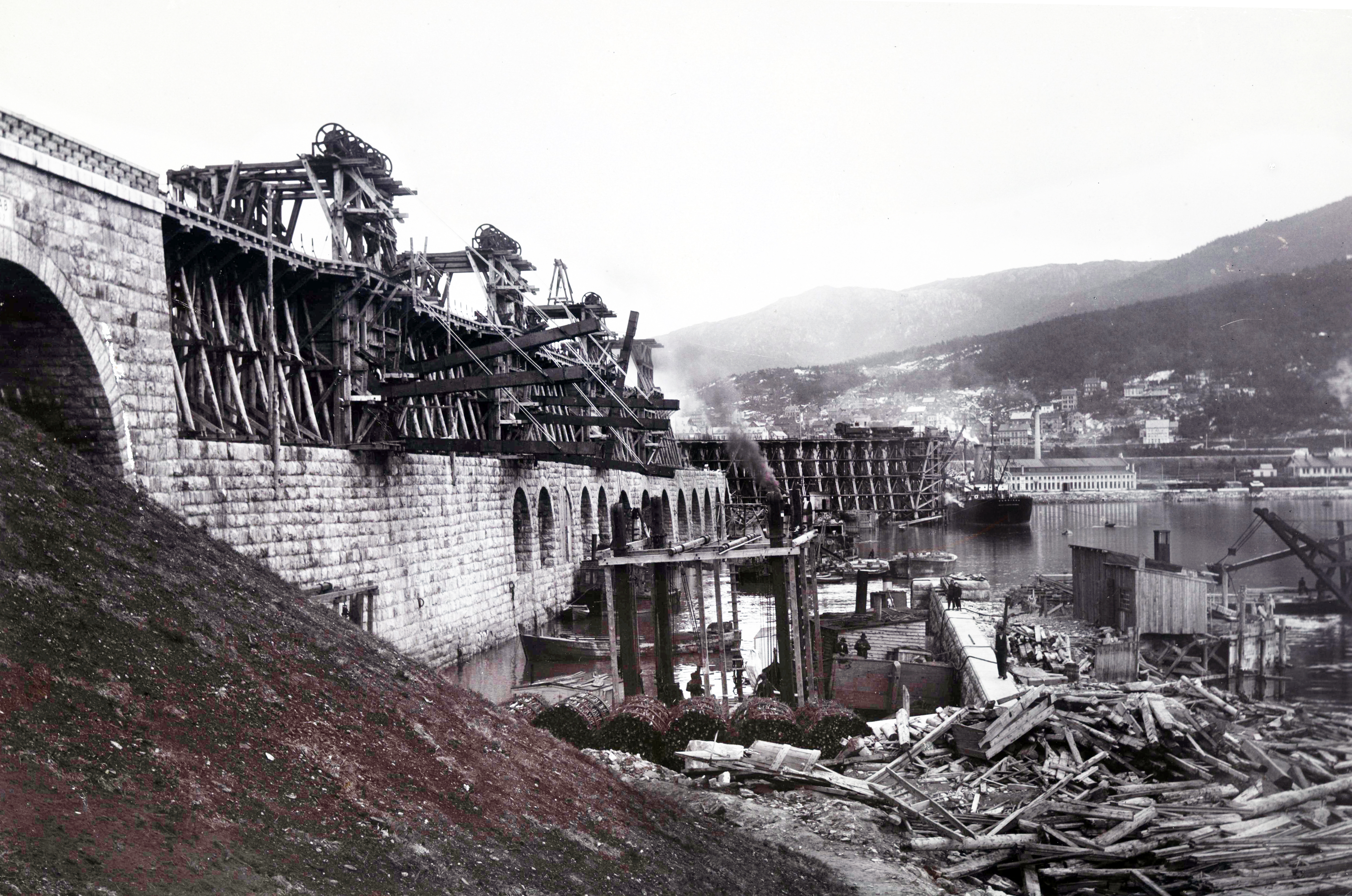 Bildet er hentet fra Nasjonalbibliotekets bildesamling. Anmerkninger til bildet var: Tittel hentet fra påskrift på komponentnr 1 Narvik, Narvik, Nordland